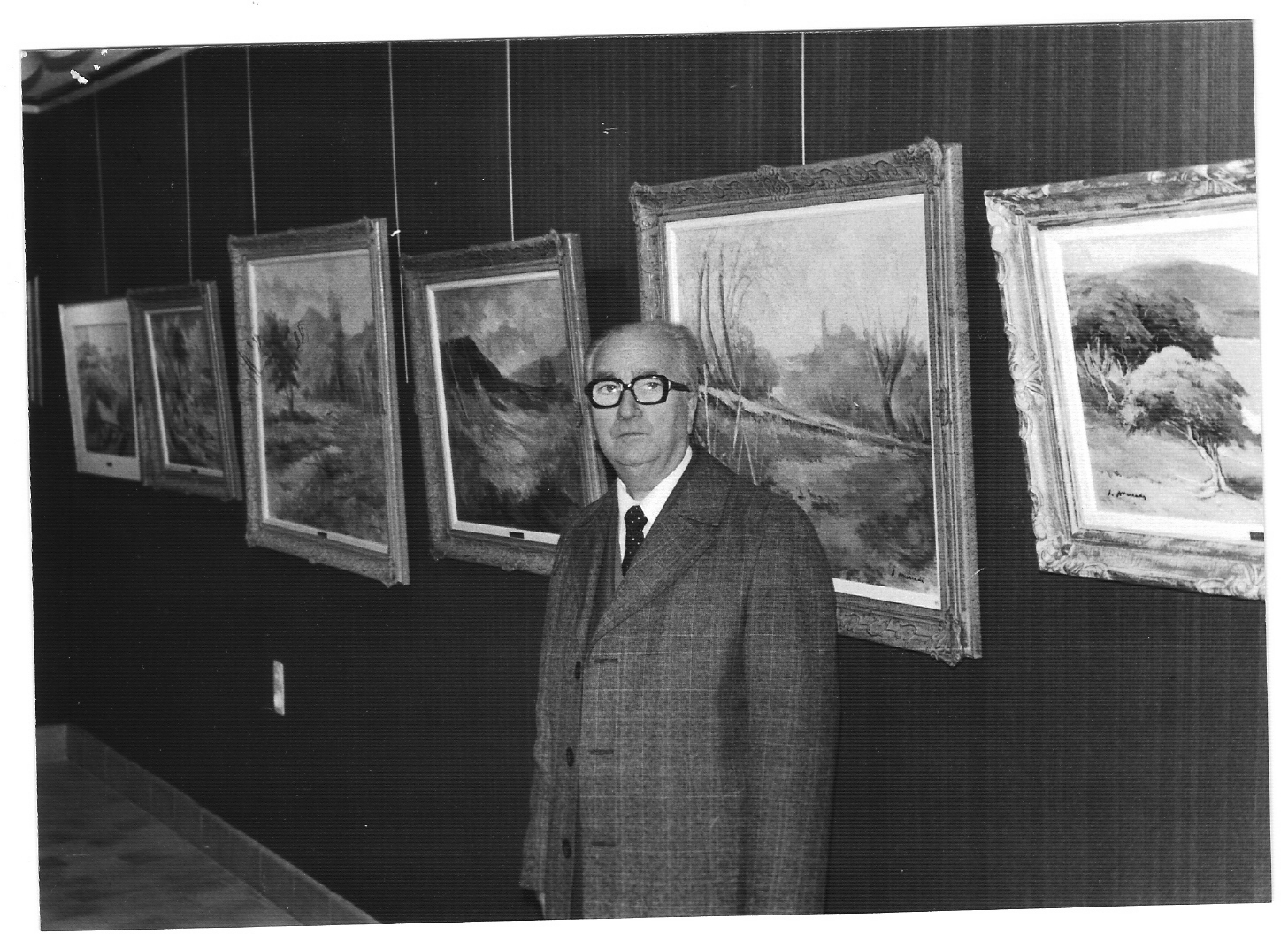 Foto relizada por Isidre Mercade Llobera a su padre en una exposición